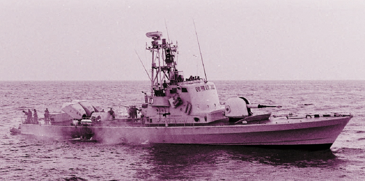 ספינה מדגם סער 3 עם תותח אורליקון במוצב מס 3